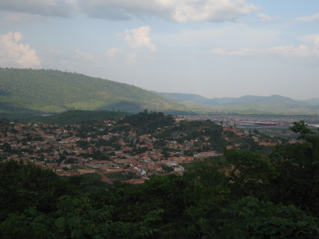 Fim de tarde vendo a beleza de Carajás!!!